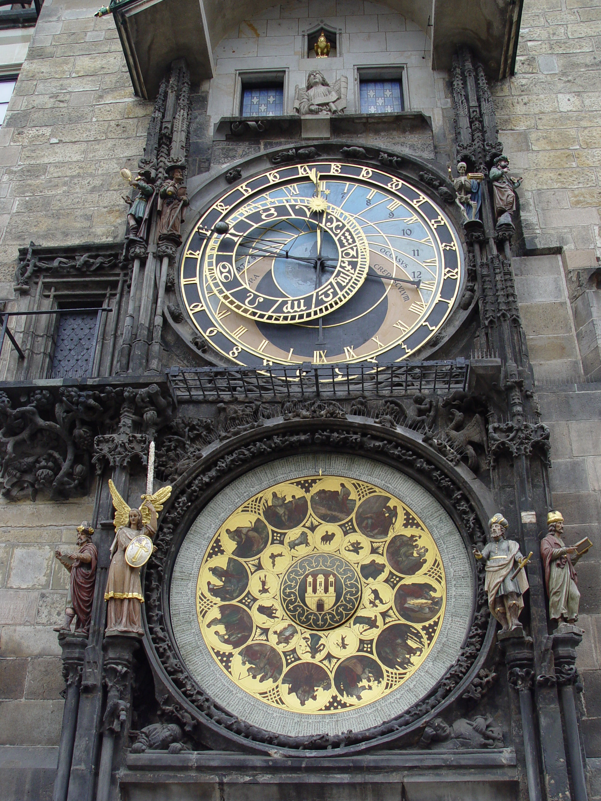 Prague - Astronomical Clock